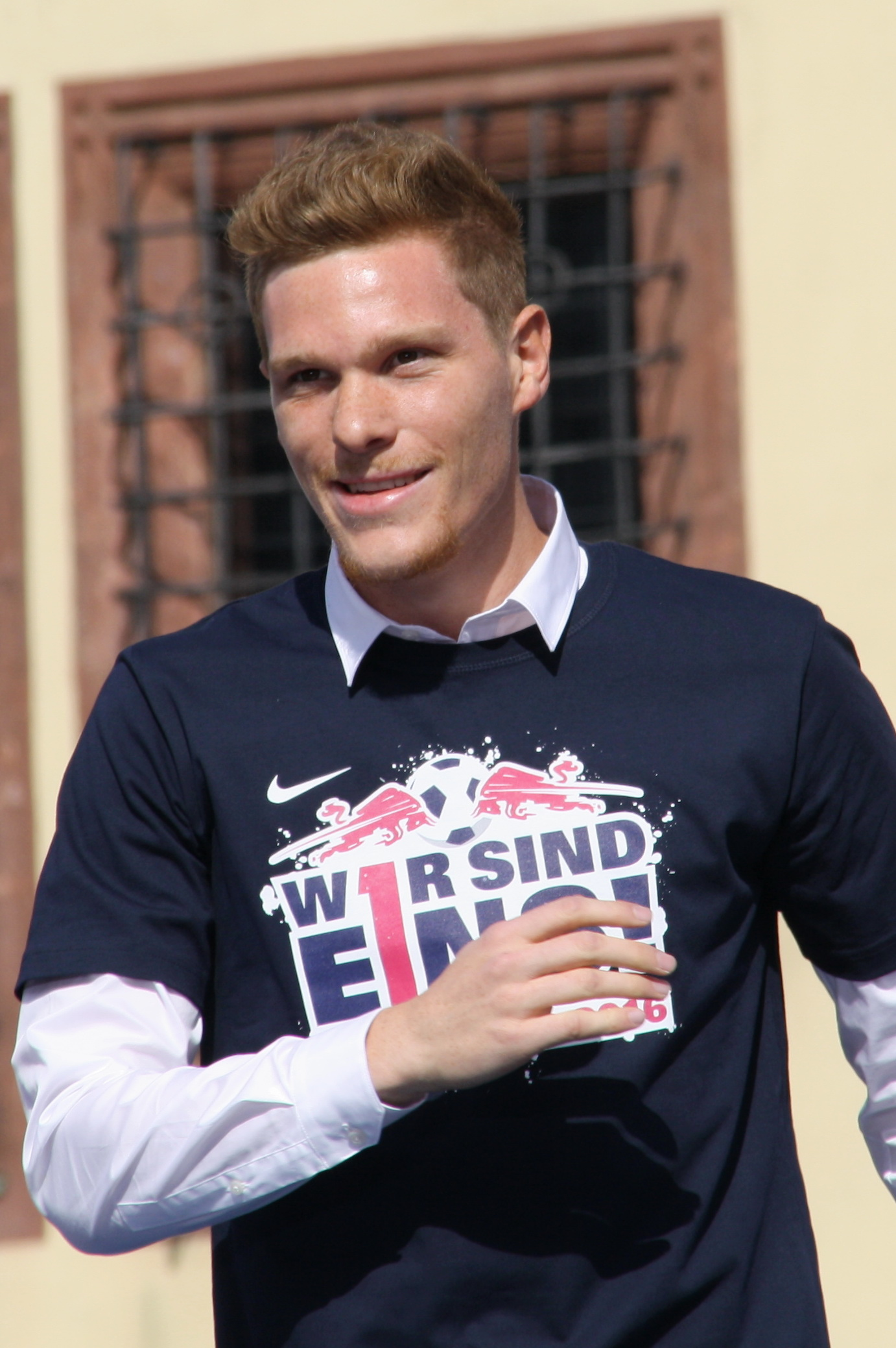 Marcel Halstenberg bei der Aufstiegsfeier RB Leipzig 2016